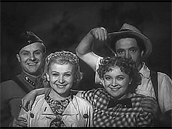 Кадр из фильма «Сердца четырёх»В.Серова, Л.Целиковская, Е.Самойлов, П.Шпрингфельд